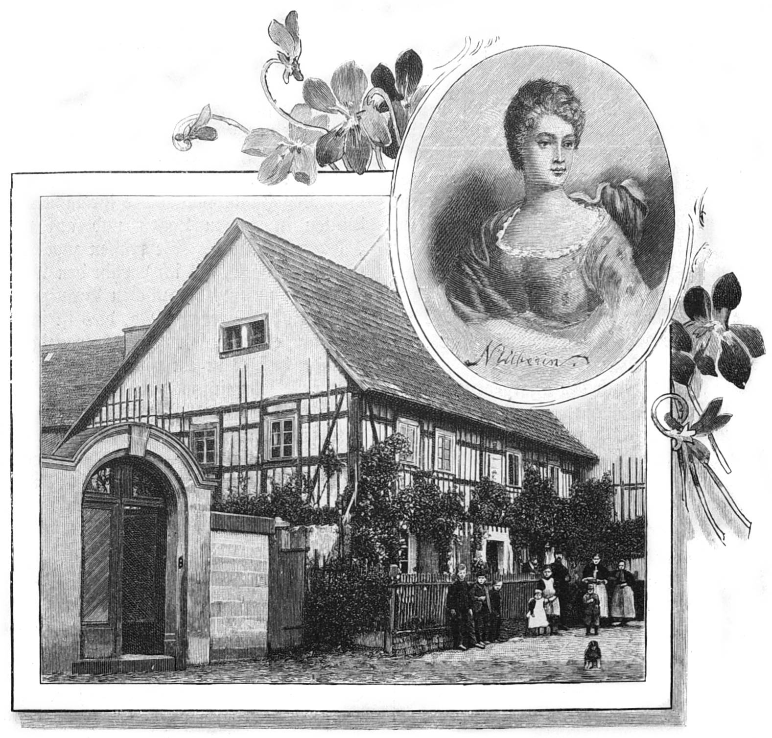 Bild aus Seite 148 in "Die Gartenlaube". Image from page 148 of journal Die Gartenlaube, 1897.